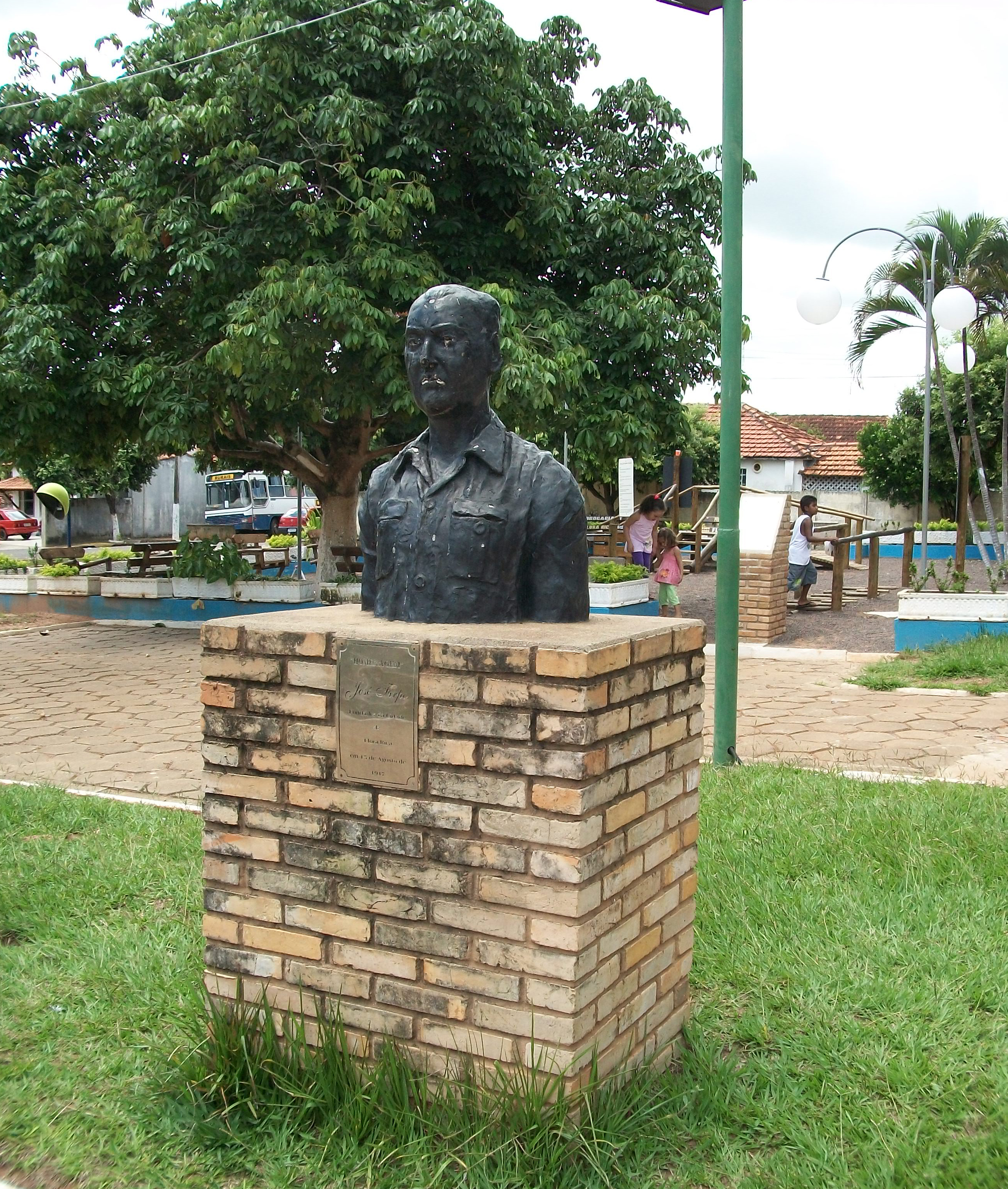 Busto de José Firpo, fundador de Flora Rica-SP, Brasil.